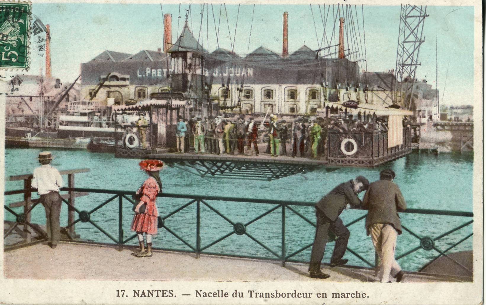 Carte postale ancienne sans mention d'éditeur, n°17 : NANTES - Nacelle du Transbordeur en marche